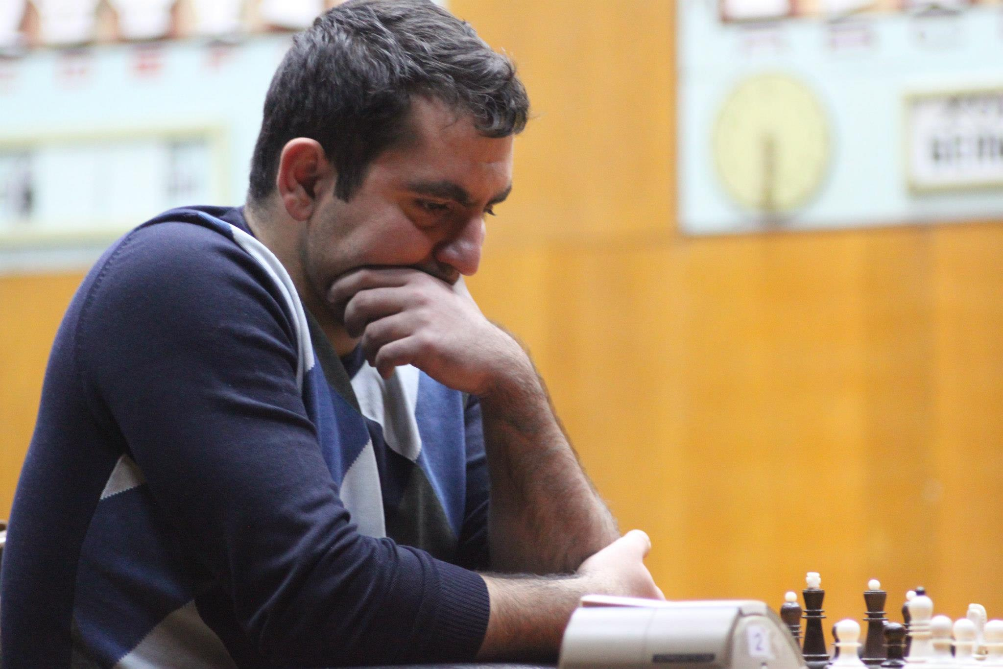 Լեւոն Բաբուջյան